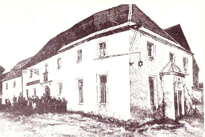 Schloss Altenstadt an der Waldnaab